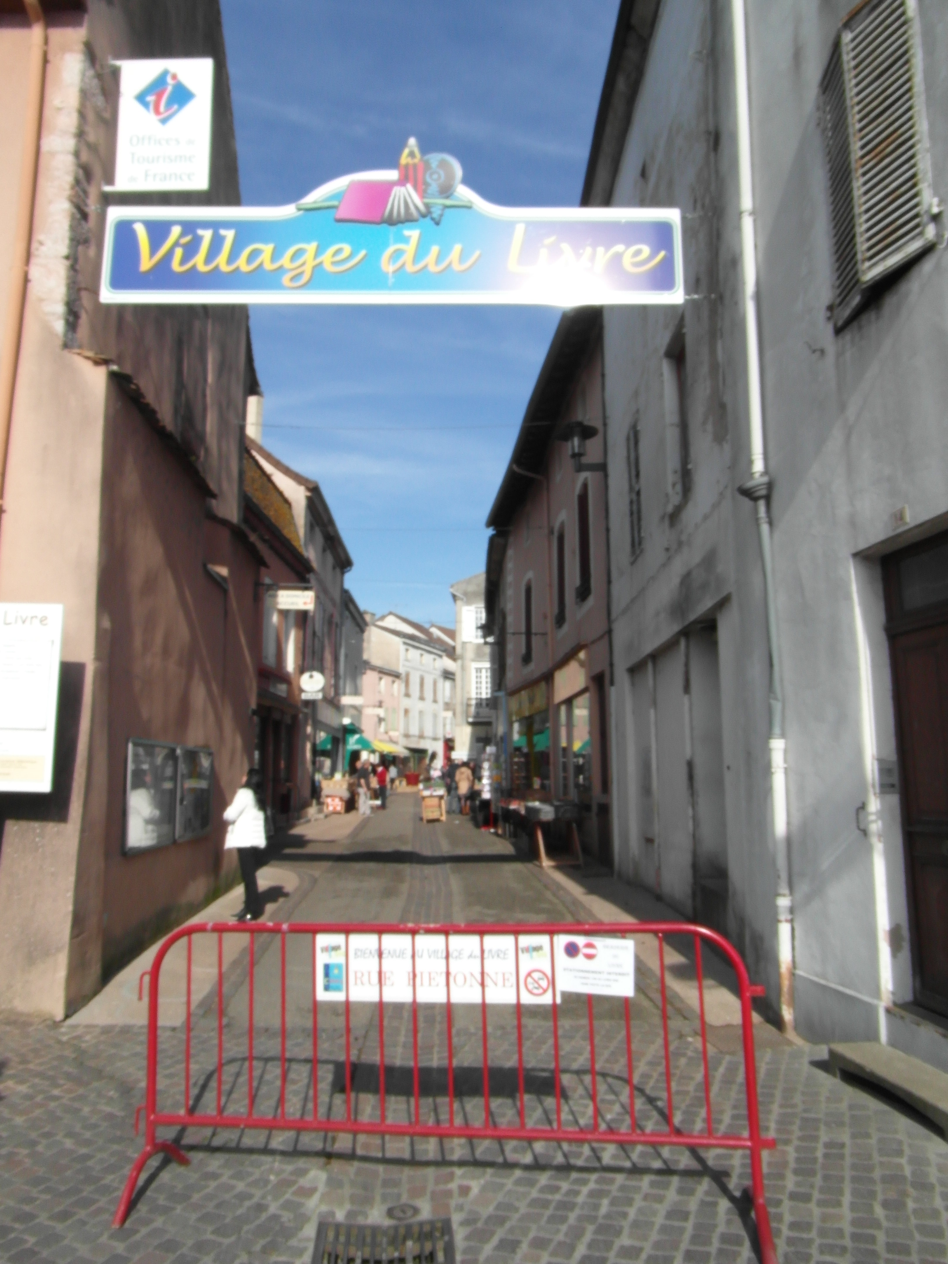 Entrée de la Grande rue à Cuisey